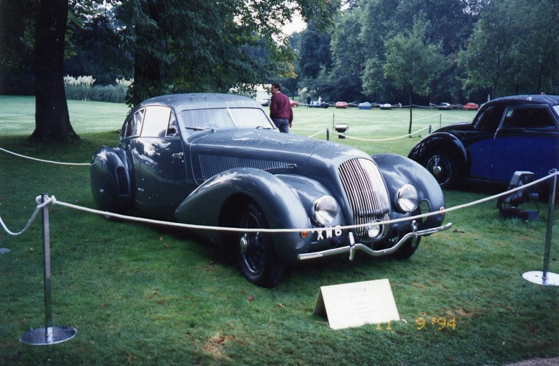 Bentley 'Embiricos' carrossée par Pourtout - Concours d'Elégance Bagatelle